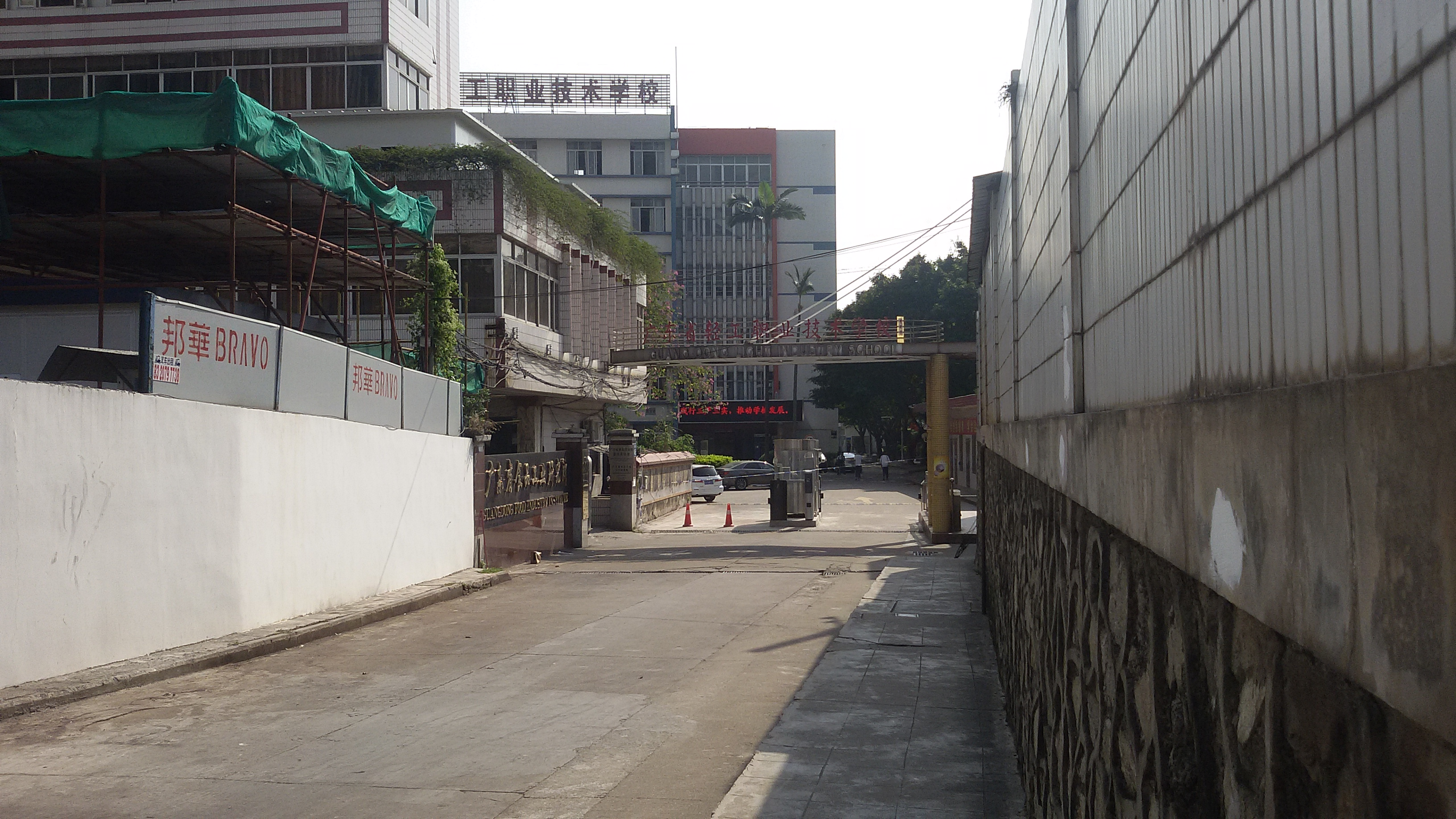 粵語: 廣東省輕工職業技術學校